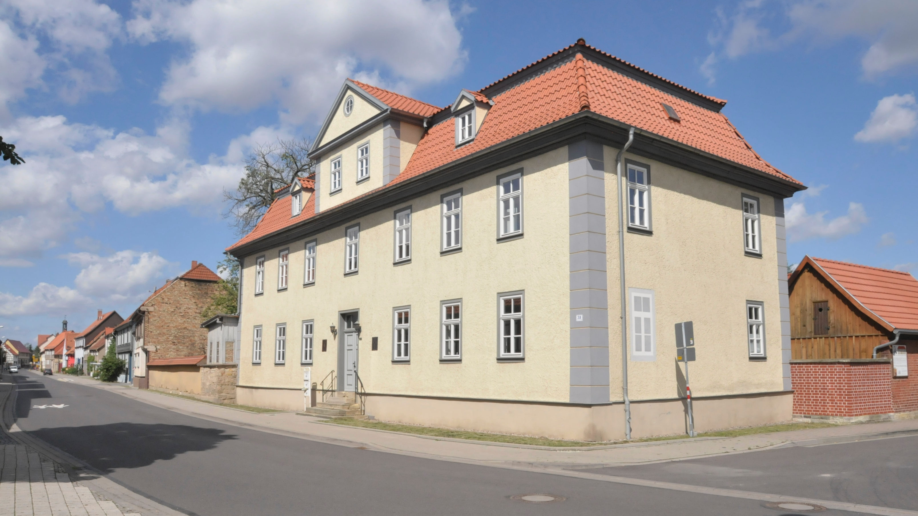 Wandersleben, Pfarrhaus der ev.-luth. Kirchgemeinde